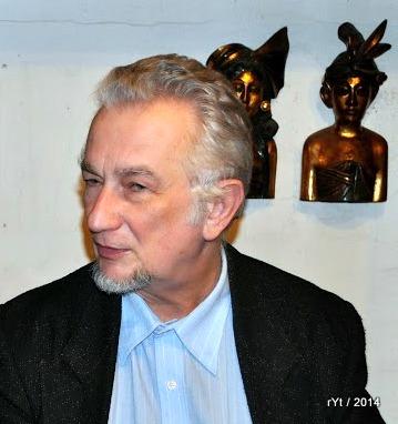 Zdjęcie portetowe